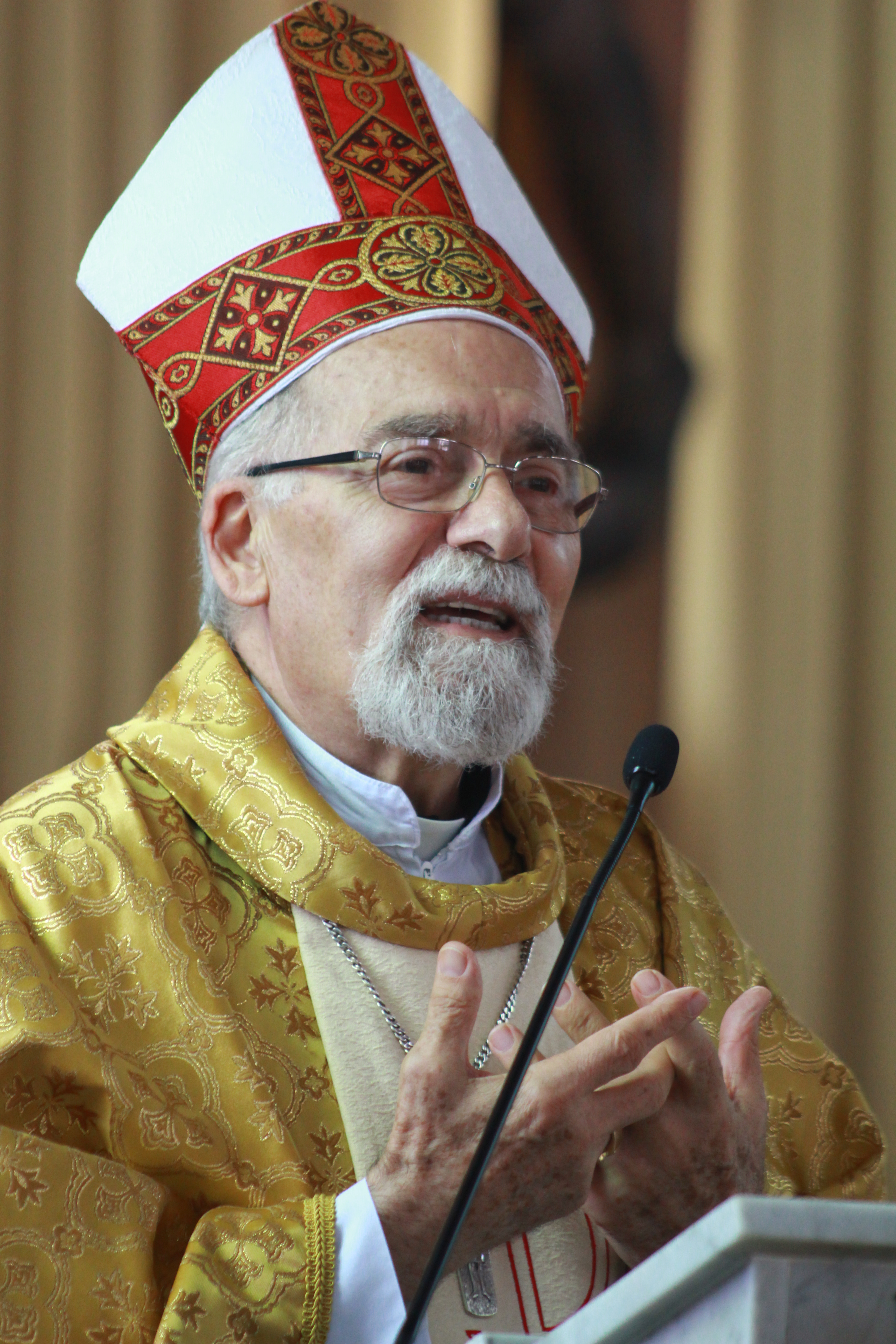 Homilía de la Misa Crismal.